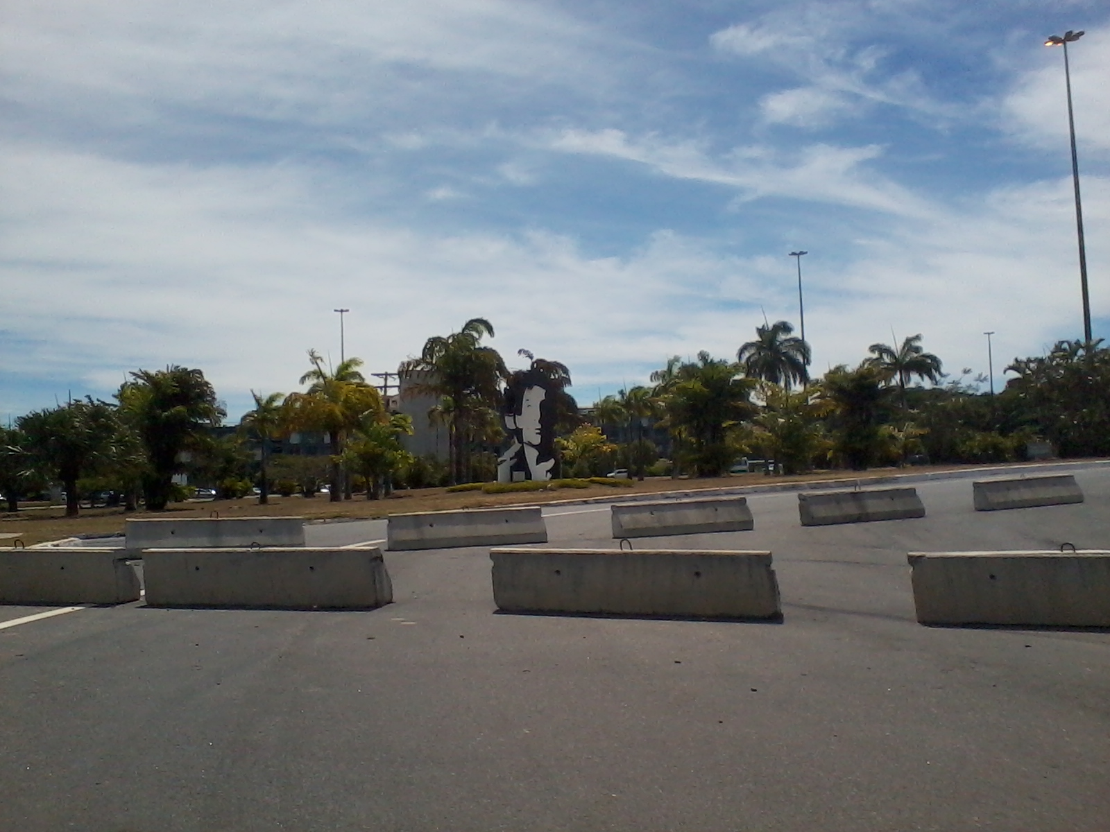 Monumento a Ayrton Senna no Circuito Ayrton Senna, em Salvador, Brasil.